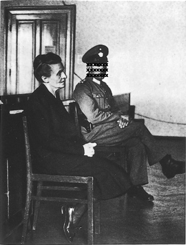 Karoline Redler mit einem Wachbeamten vor der Gerichtsverhandlung